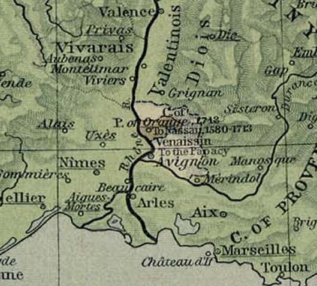 Oranje in 1601